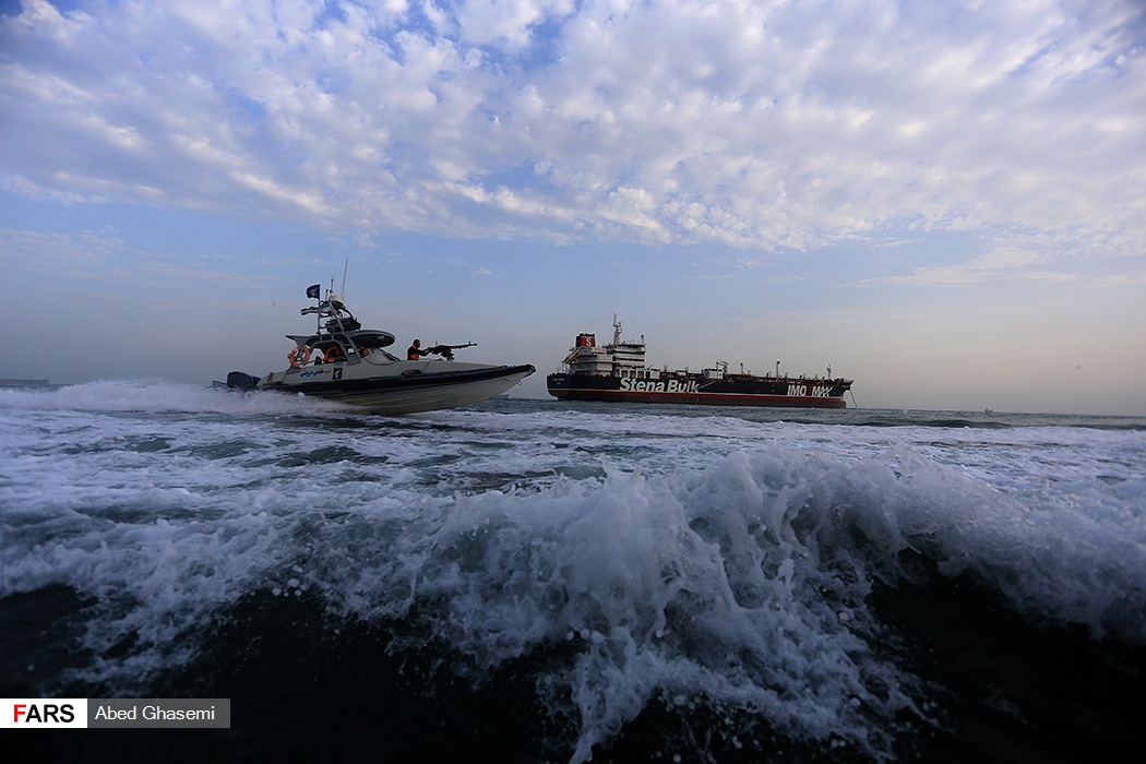 نفتکش انگلیسی استینا ایمپرو، توقیف‌شده توسط ایران